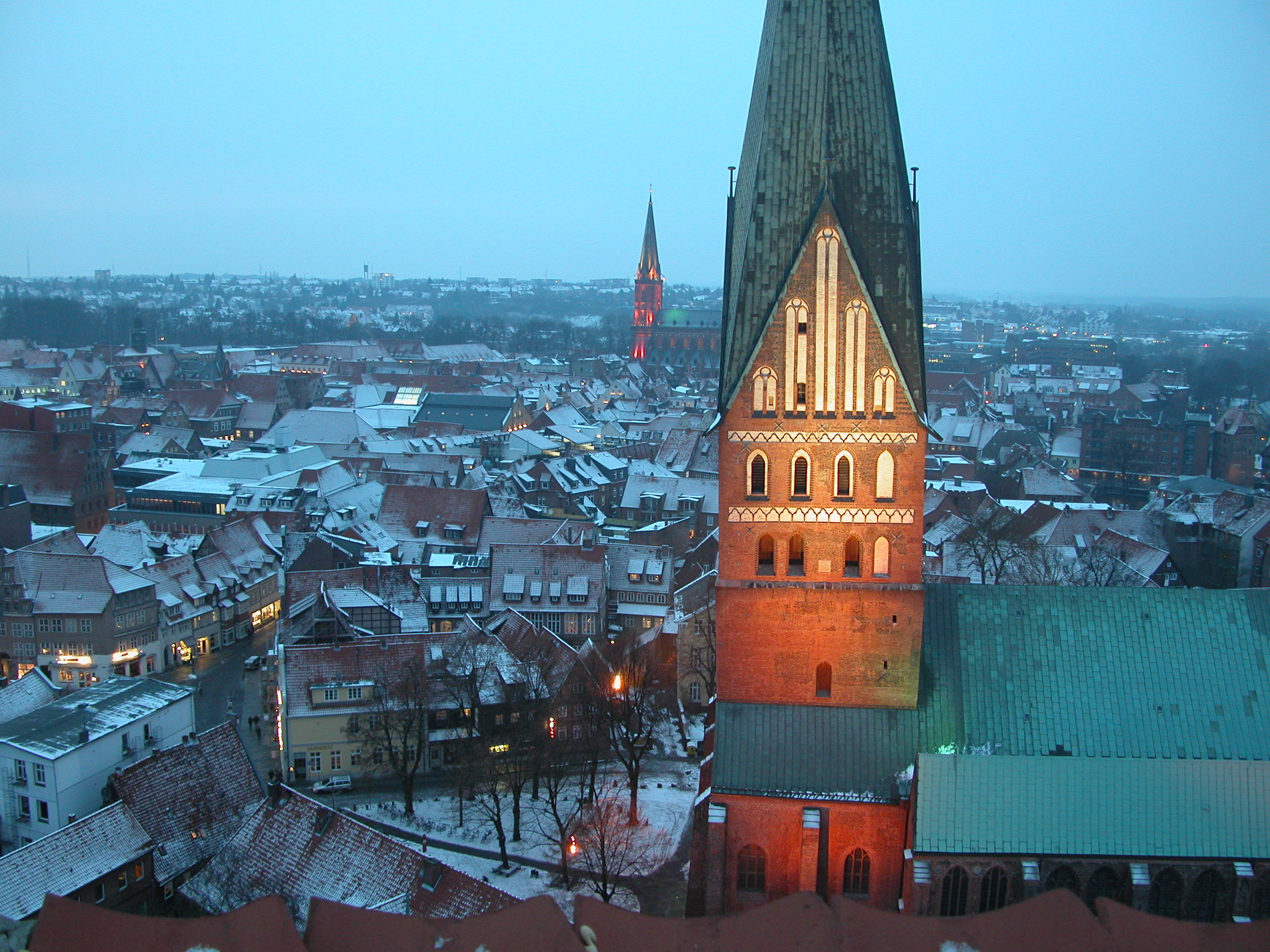 Vista de Luneburgo desde la Wassarturm